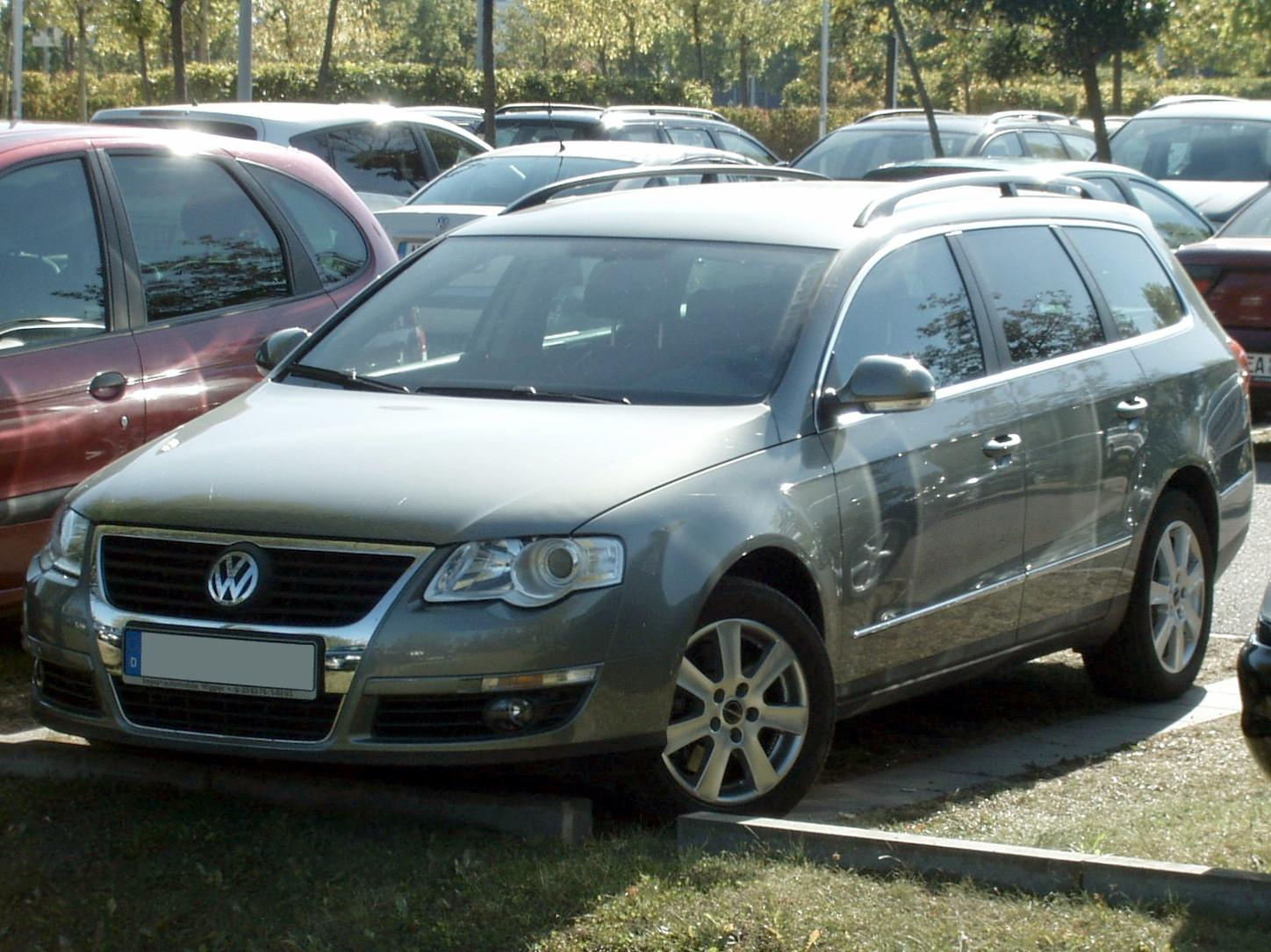 VW Passat Variant